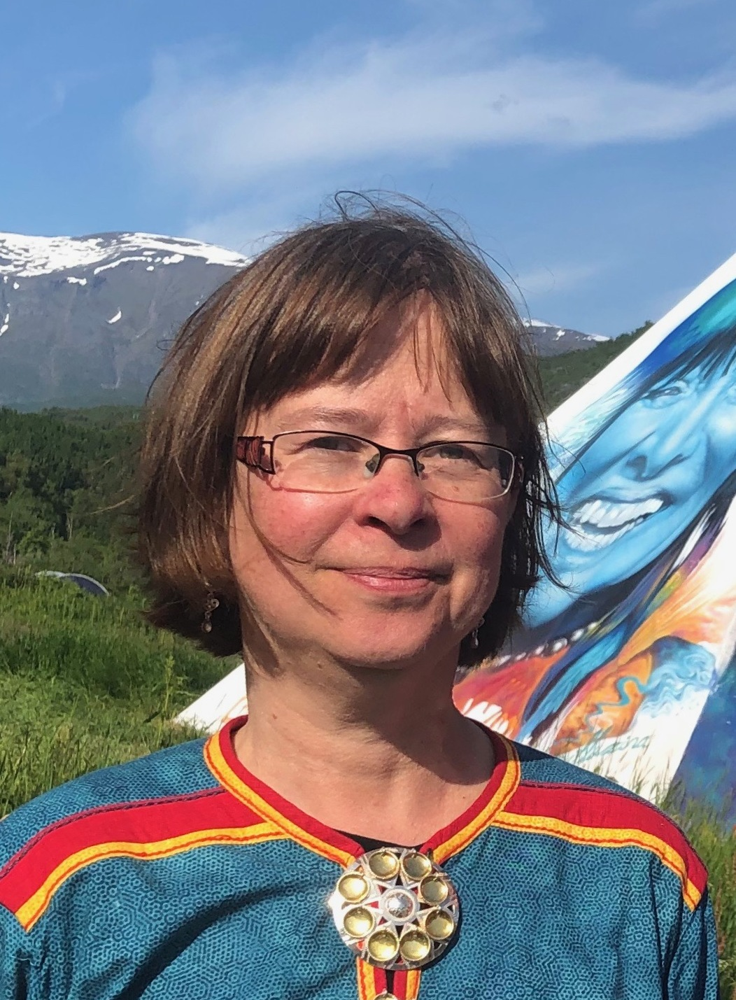 Staff from Divvun at University of Tromsø at Riddu Riđđu festival 2019